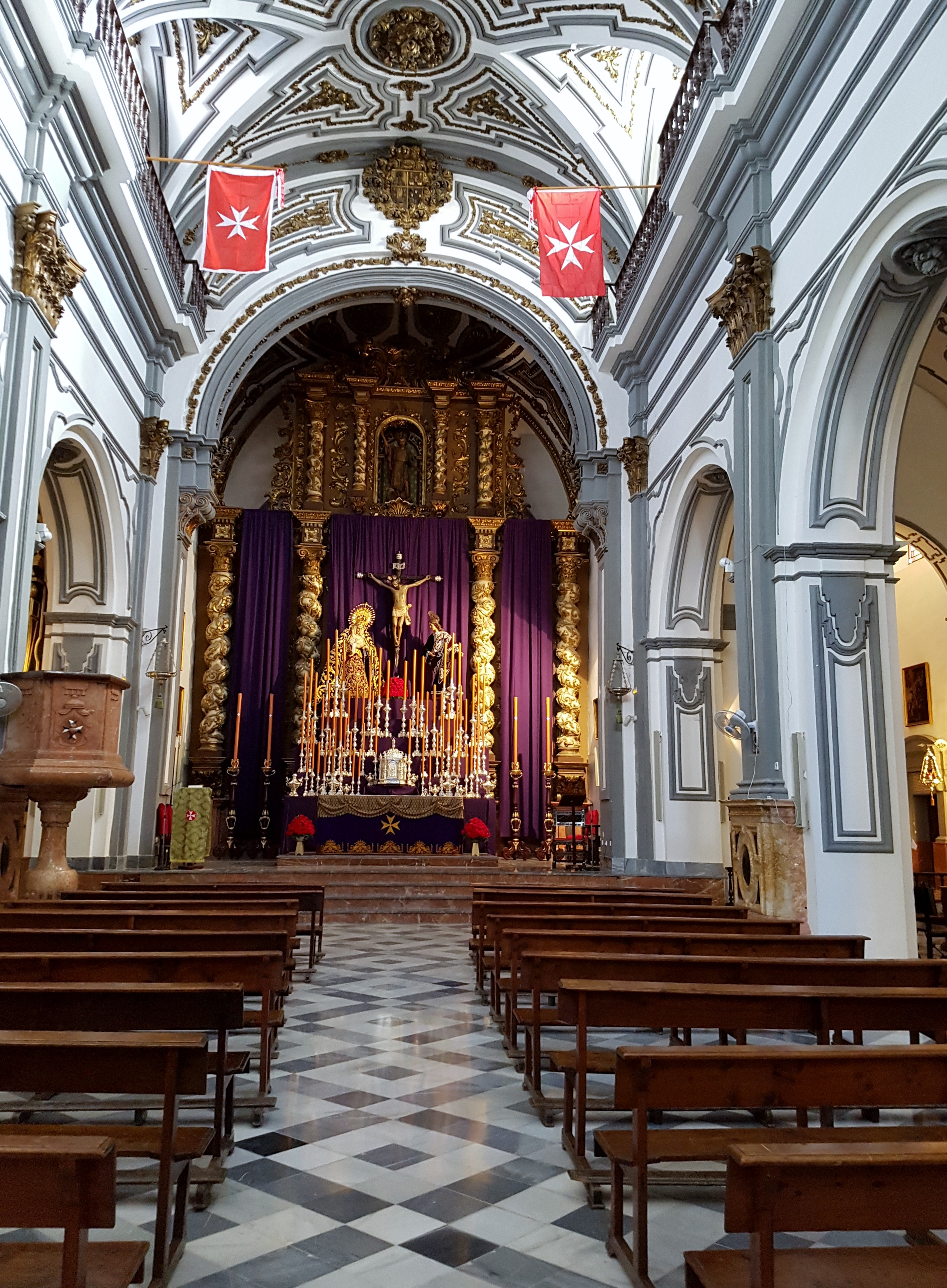 Iglesia de San Juan Bautista en Málaga. Nave central y altar mayor. El Cristo de la Vera Cruz al centro, de autor anónimo del siglo XVI; Nuestra Señora del Mayor Dolor a la izquierda y San Juan Evangelista a la derecha, ambas esculturas de Antonio Dubé de Luque. Más arriba del Cris, san Juan Bautista